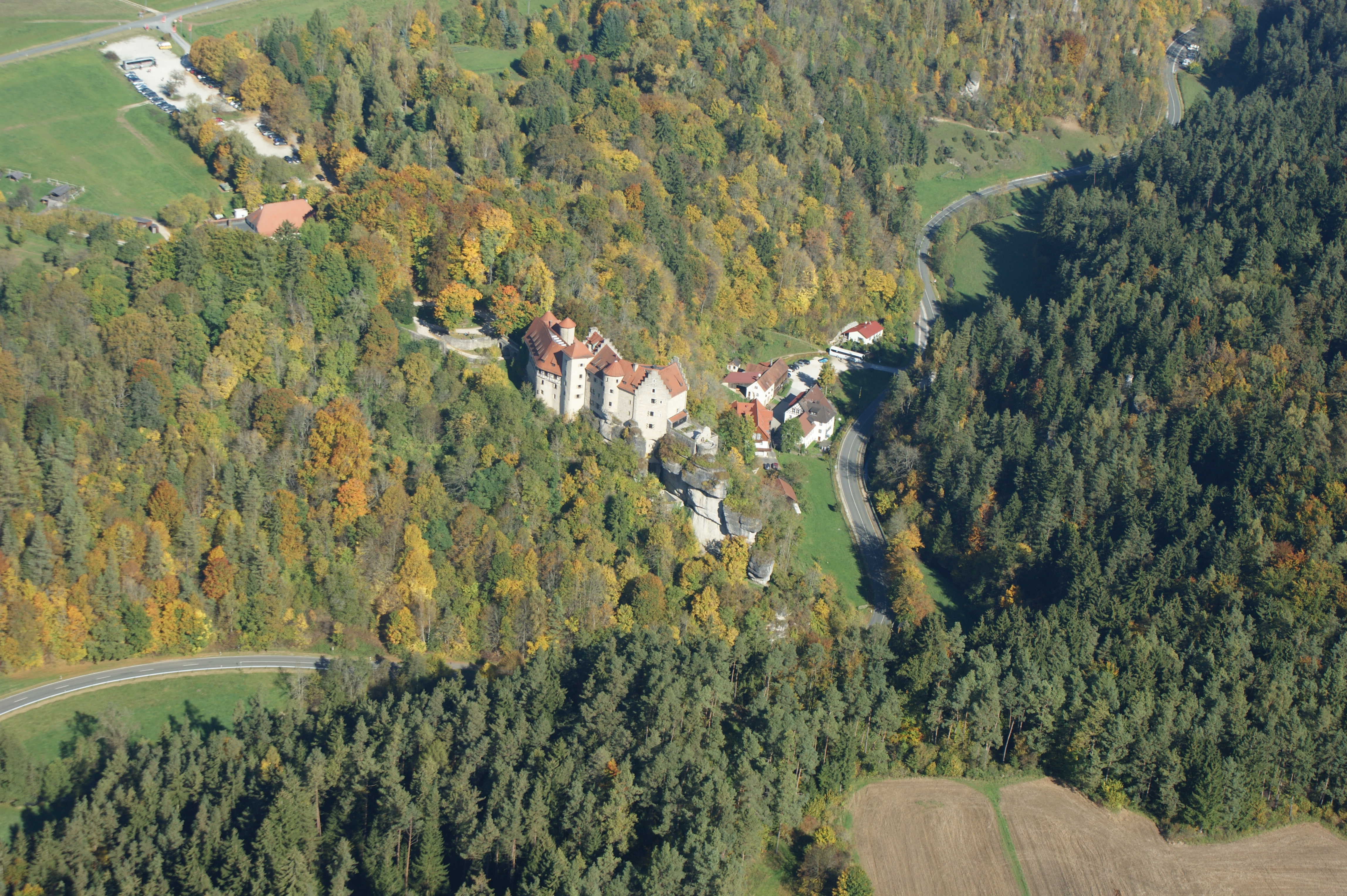 Burg Rabenstein im Herbst